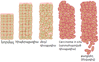 Նորմալ բջիջների համեմատումը քաղցկեղային բջիջների հետ